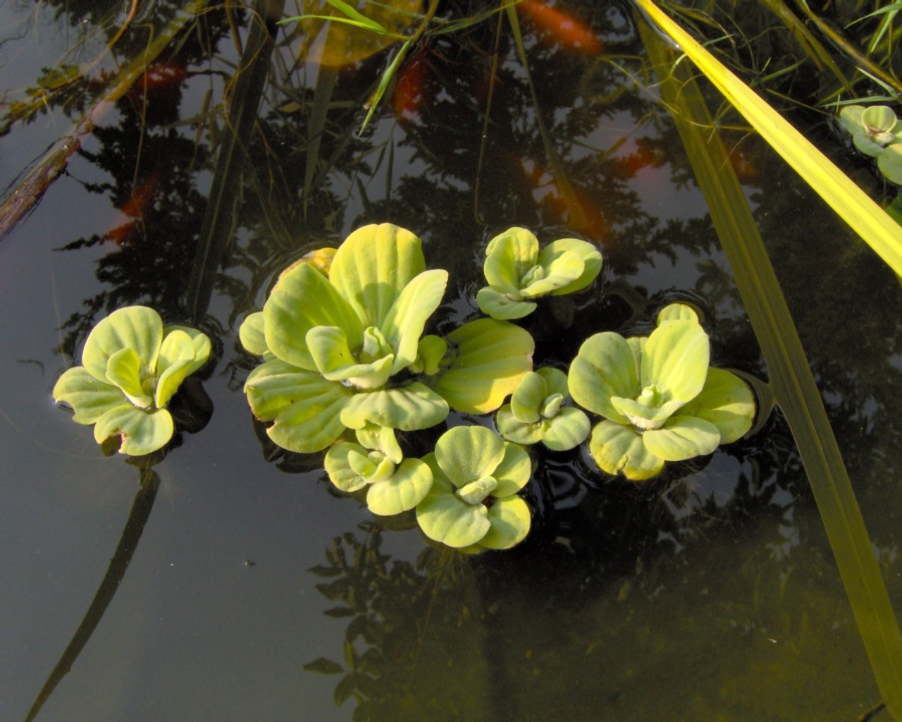 Beschreibung: Pistia stratiotes (Herbst, Gartenteich) Quelle: selbst fotografiert Datum: 2005-10-15 Fotograf oder Zeichner: User:Kristjan